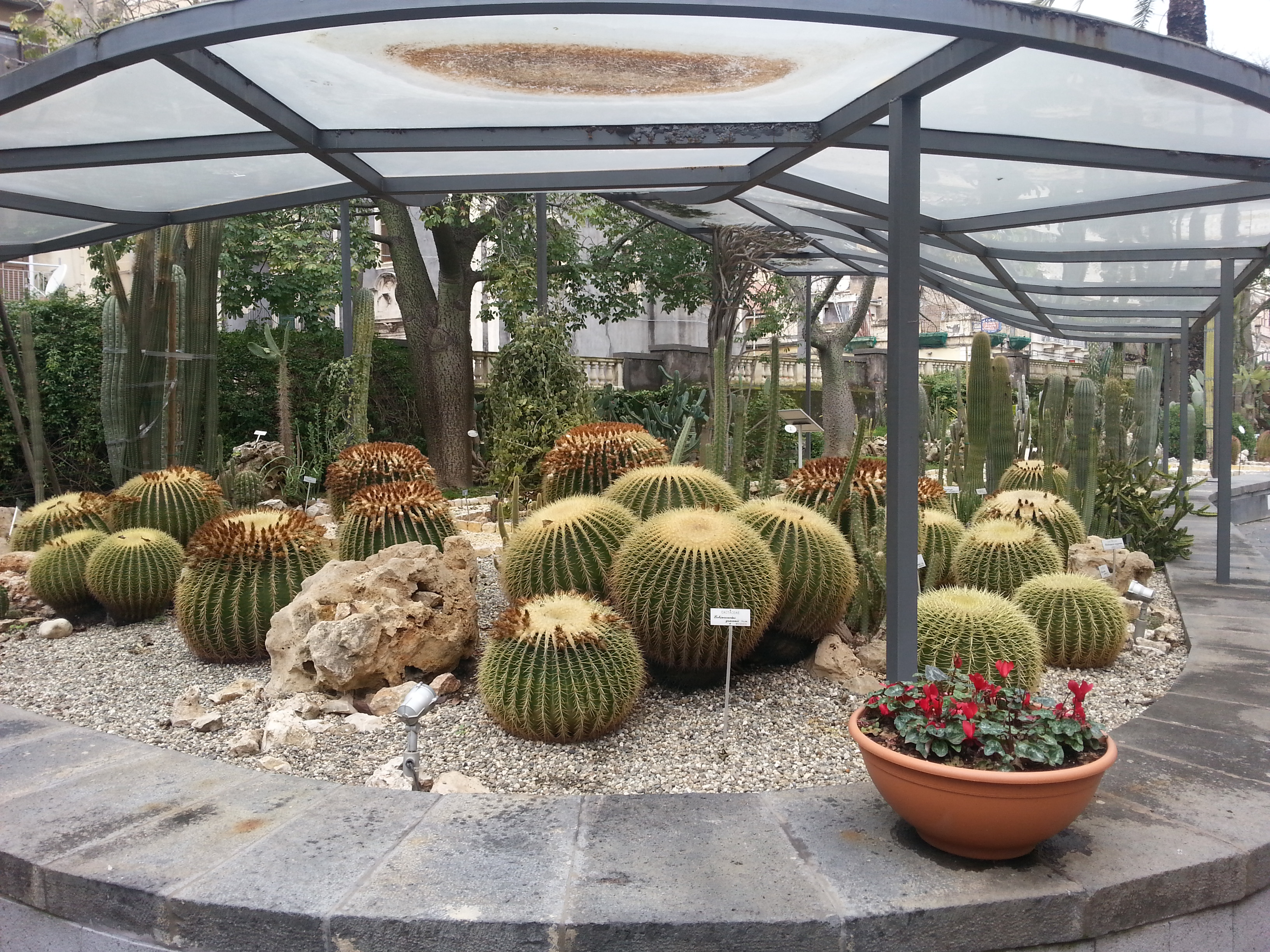 Orto botanico di Catania Collezione di piante succulente